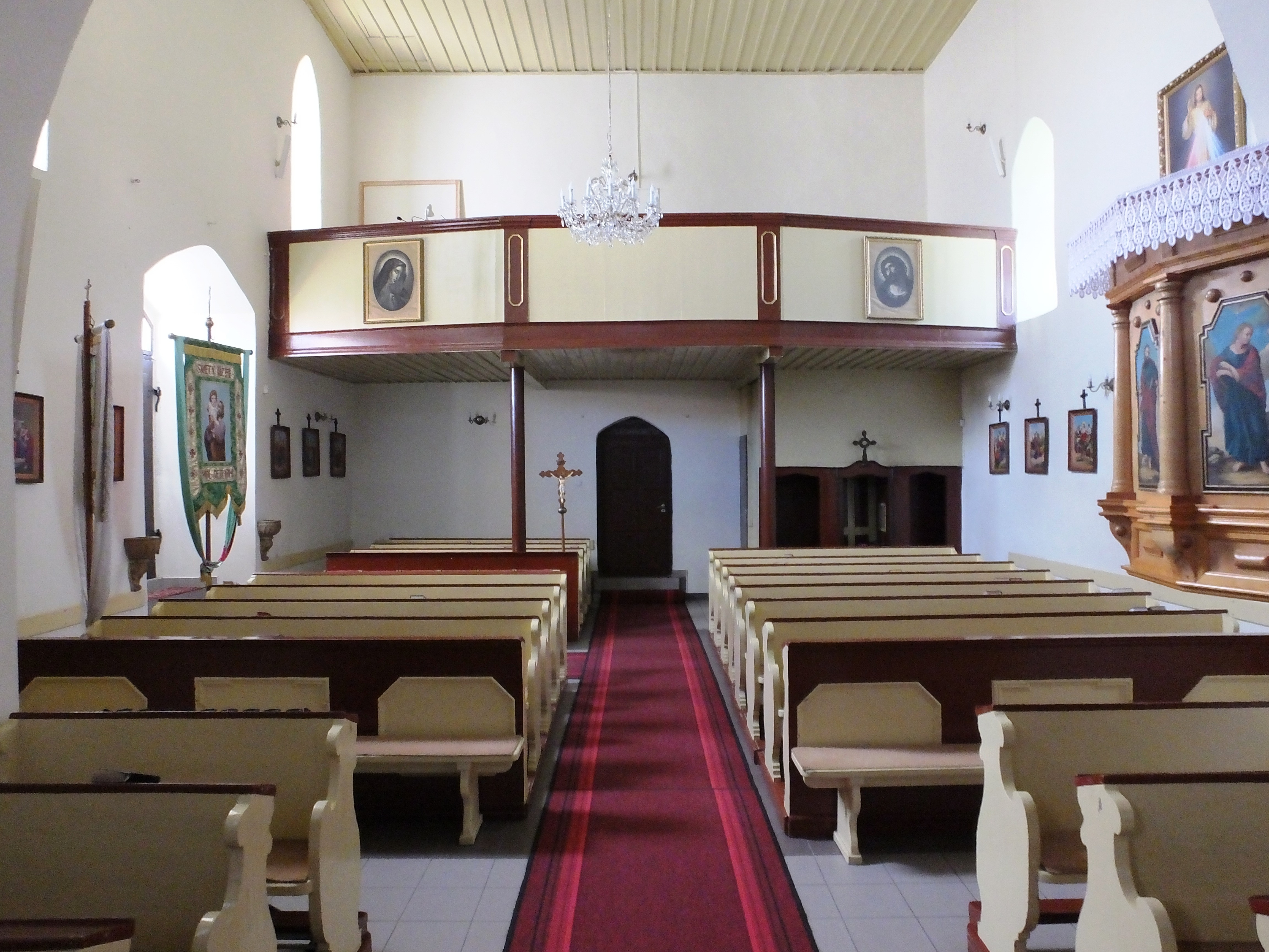 Wnętrze kościoła w Pisarzowicach k/Kamiennej Góry